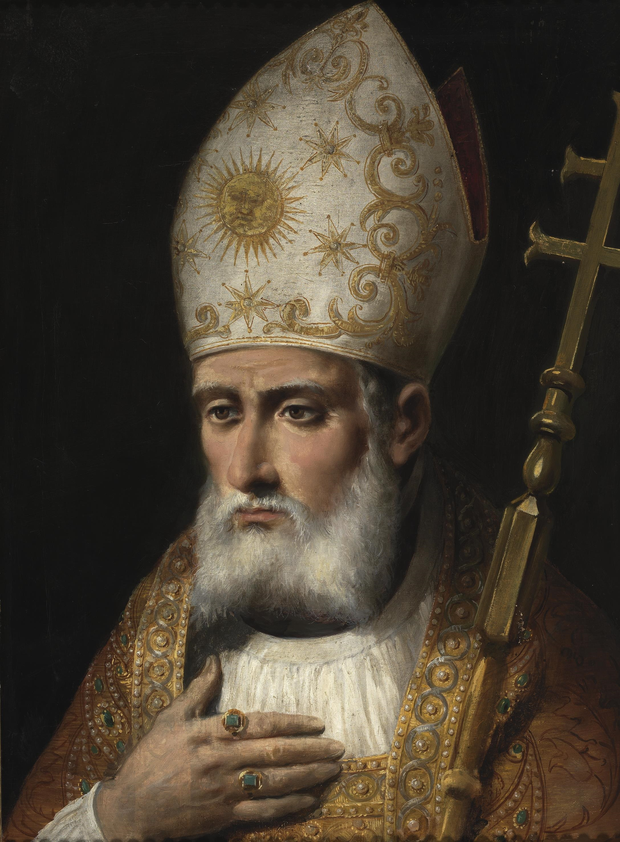 Retrato de San Juan de Ribera (1532-1611), que fue patriarca latino de Antioquía, arzobispo y virrey de Valencia y obispo de Badajoz. Esta obra del Museo del Prado es una copia decimonónica ejecutada por Salvador Martinez Cubells del retraro original que Juan de Sariñena pintó de San Juan de Ribera en el año 1611 y que aún se conserva en la catedral de Valencia.